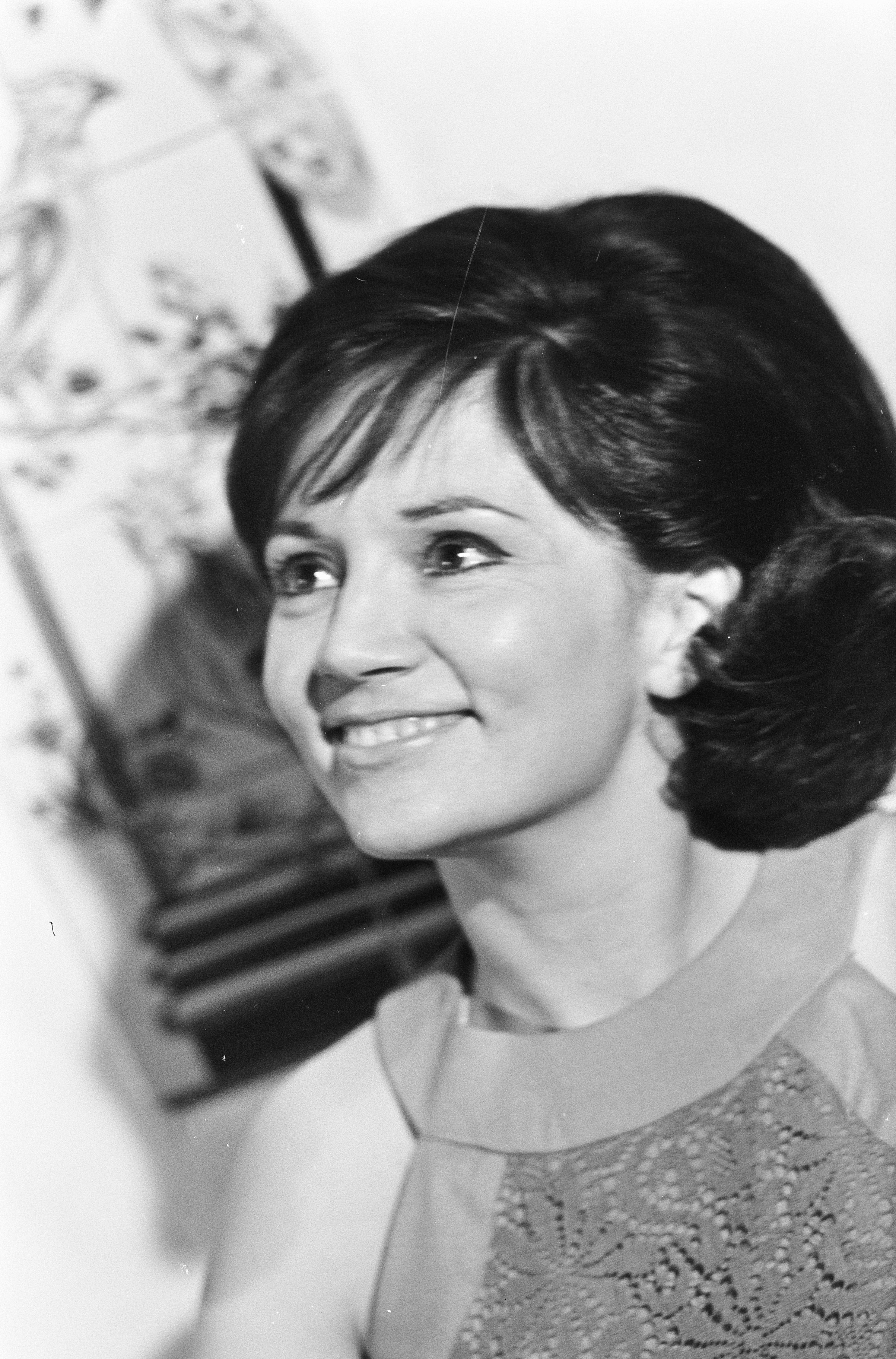 Collectie / Archief : Fotocollectie Anefo Reportage / Serie : [ onbekend ] Beschrijving : Thérèse Steinmetz tijdens repetitie voor Nederlands Songfestival Datum : 22 februari 1967 Trefwoorden : SONGFESTIVALS Persoonsnaam : Steinmetz, Thérèse Fotograaf : Nijs, Jac. de / Anefo Auteursrechthebbende : Nationaal Archief Materiaalsoort : Negatief (zwart/wit) Nummer archiefinventaris : bekijk toegang 2.24.01.05 Bestanddeelnummer : 920-1001